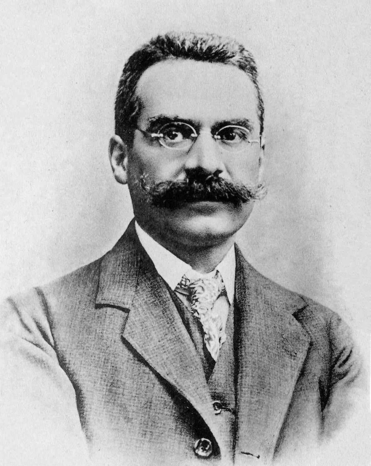 foto di Giulio Ascoli, medico; da non confondere coll'omonimo matematico (1843 – 1896)